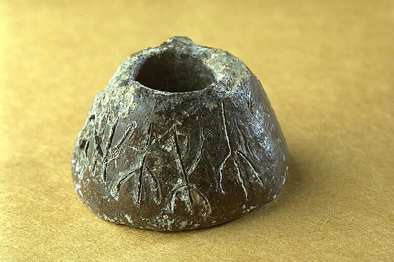 Med runor. Inskriften lyder: Rodtrud .. Motiv: Sländtrissa av bly i Gotlands Fornsal, G 326. Nyckelord: Runor Kategori: Runristning/runsten Med runor. Inskriften G 326 lyder: Rodtrud.